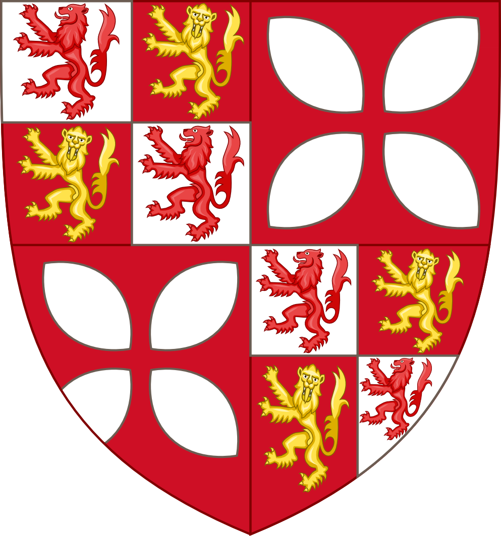 Armes de Jean d'Armagnac, comte de comminges